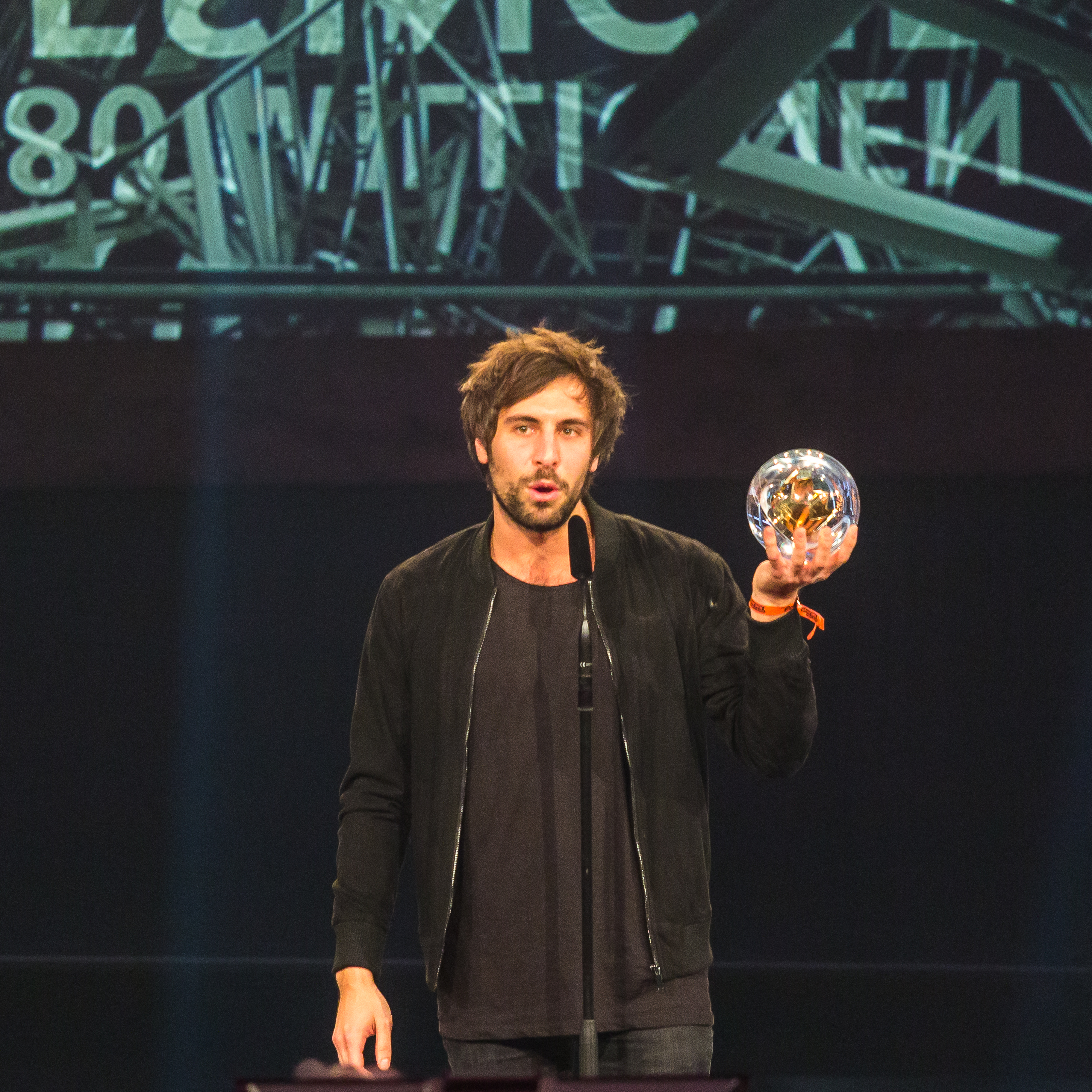 1LIVE Krone 2016 - 2015 - Show - Beste Single: Max Giesinger